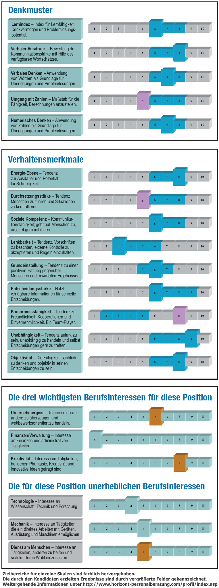 Grafik mit Skalen eines Anforderungsprofils und Ergebnis eines Kandidaten